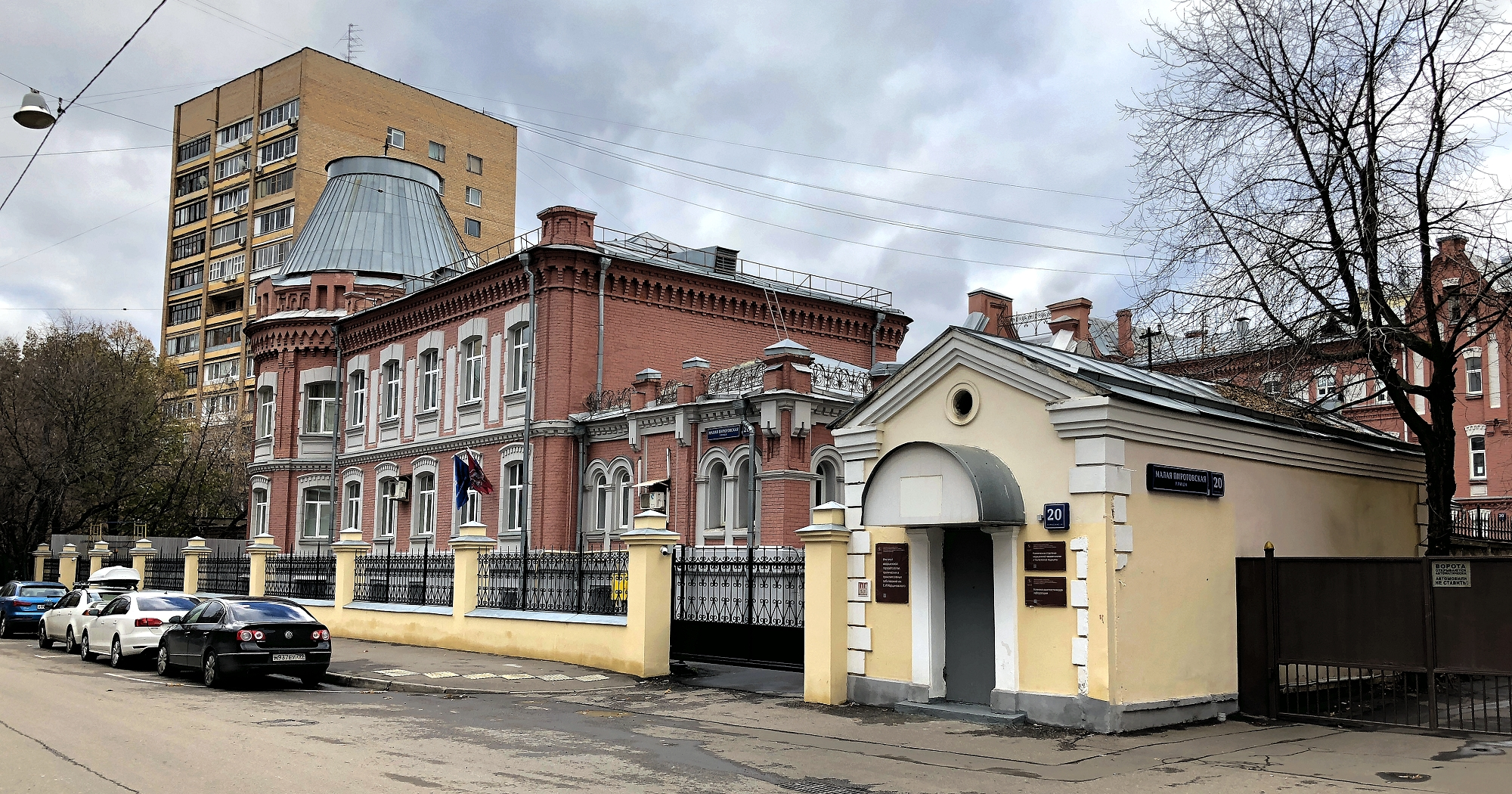 Малая Пироговская улица, 20. Институт медицинской паразитологии, тропических и трансмиссивных заболеваний имени Е. И. Марциновского.